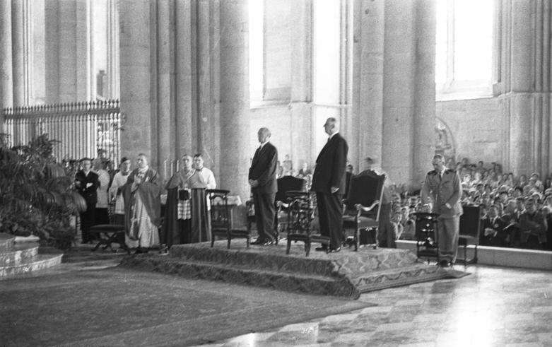 Reims / Frankreich Reise von Bundeskanzler Konrad Adenauer nach Frankreich Messe in der Kathedrale von Reims mit de Gaulle und Bundeskanzler Adenauer